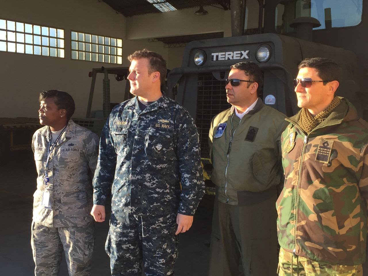 Personal de EEUU y la Argentina en Comodoro Rivadavia